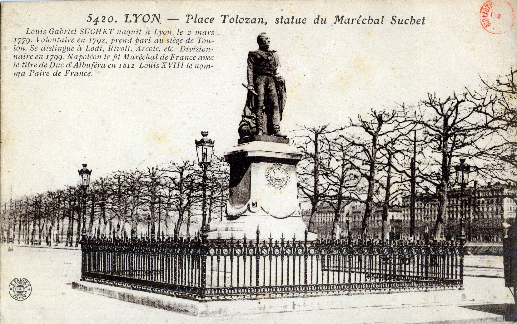 Statue du Maréchal Suchet, PlaceTolozan